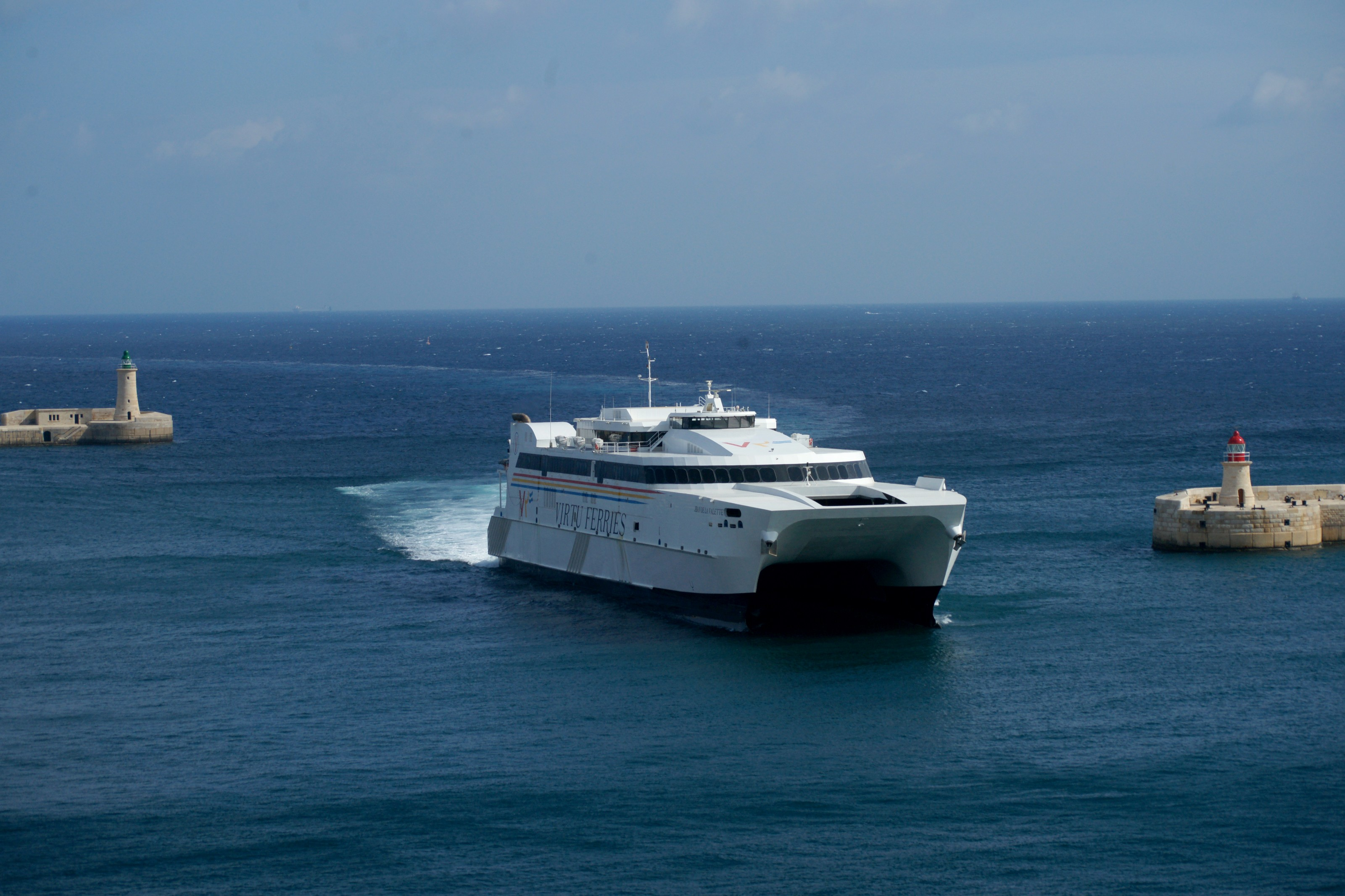 Katamaran - Fähre "Jean de la Valette" im Hafen von Valetta